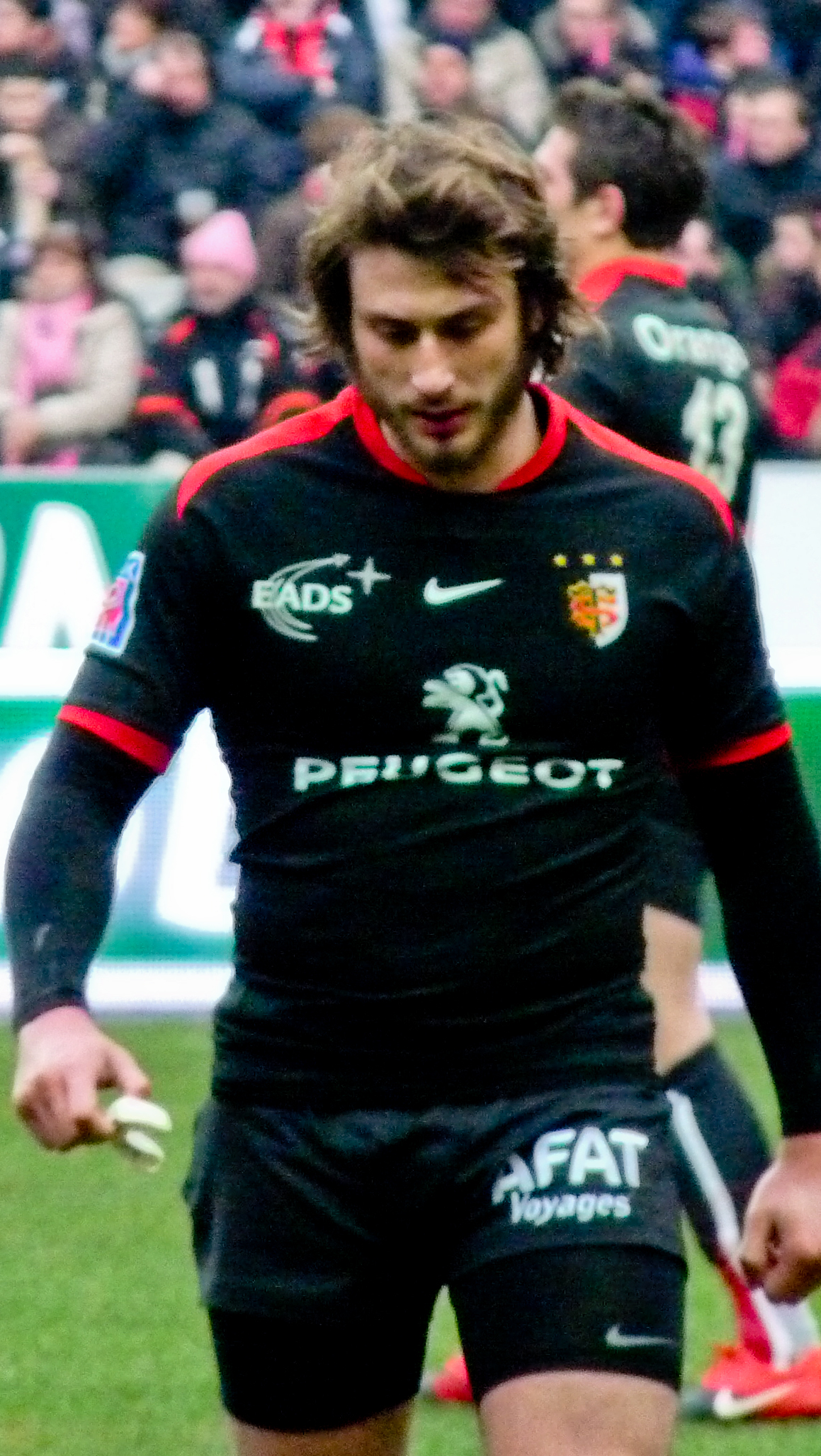 Stade français vs Stade toulousain 0-29 - 6 mars 2010